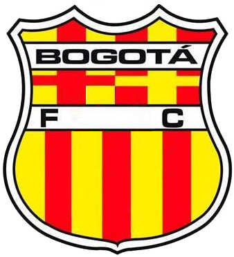 Un escudo genérico. Formas geometricas y texto.